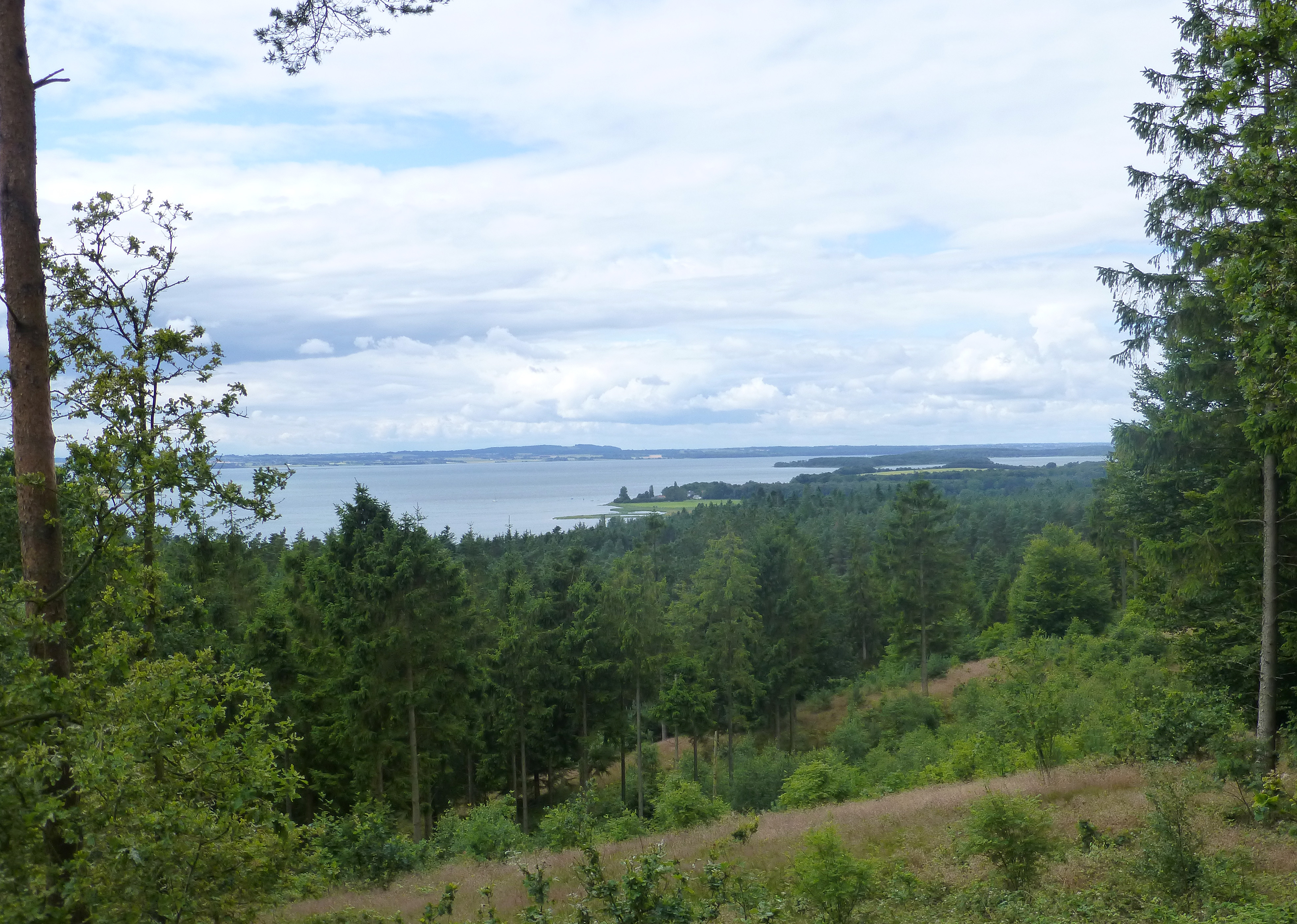 Blakshøj udsigt mod syd over Alrø